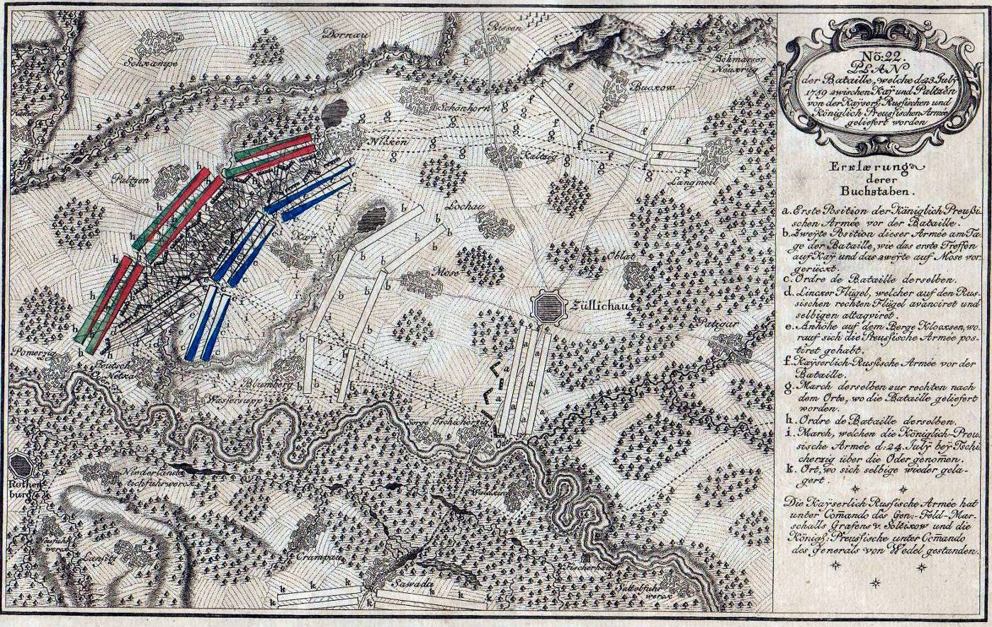 Bitwa pod Kijami (niem. Kay, 23.7.1759)